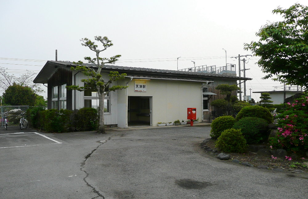 日豊本線天津駅・駅舎 投稿者↑PON（ウエポン）が2007年5月5日に撮影 一部編集の上で2007年5月12日にアップロード